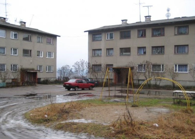 Мийнала